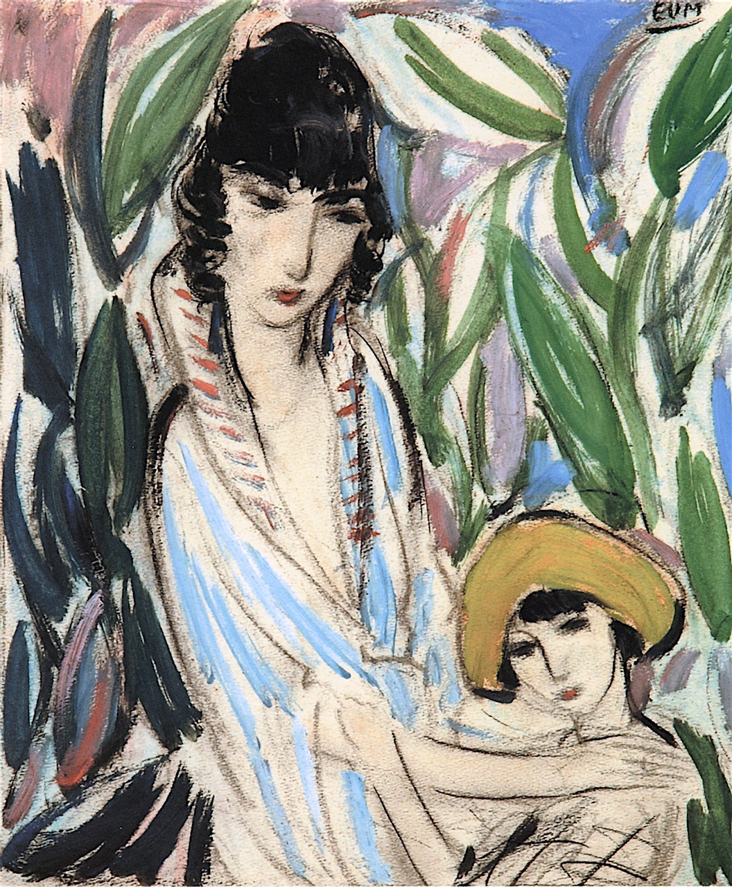 Belgian artist Eugeen van Mieghem (1875-1930). ================= Belgian artist Eugeen van Mieghem (1875-1930).